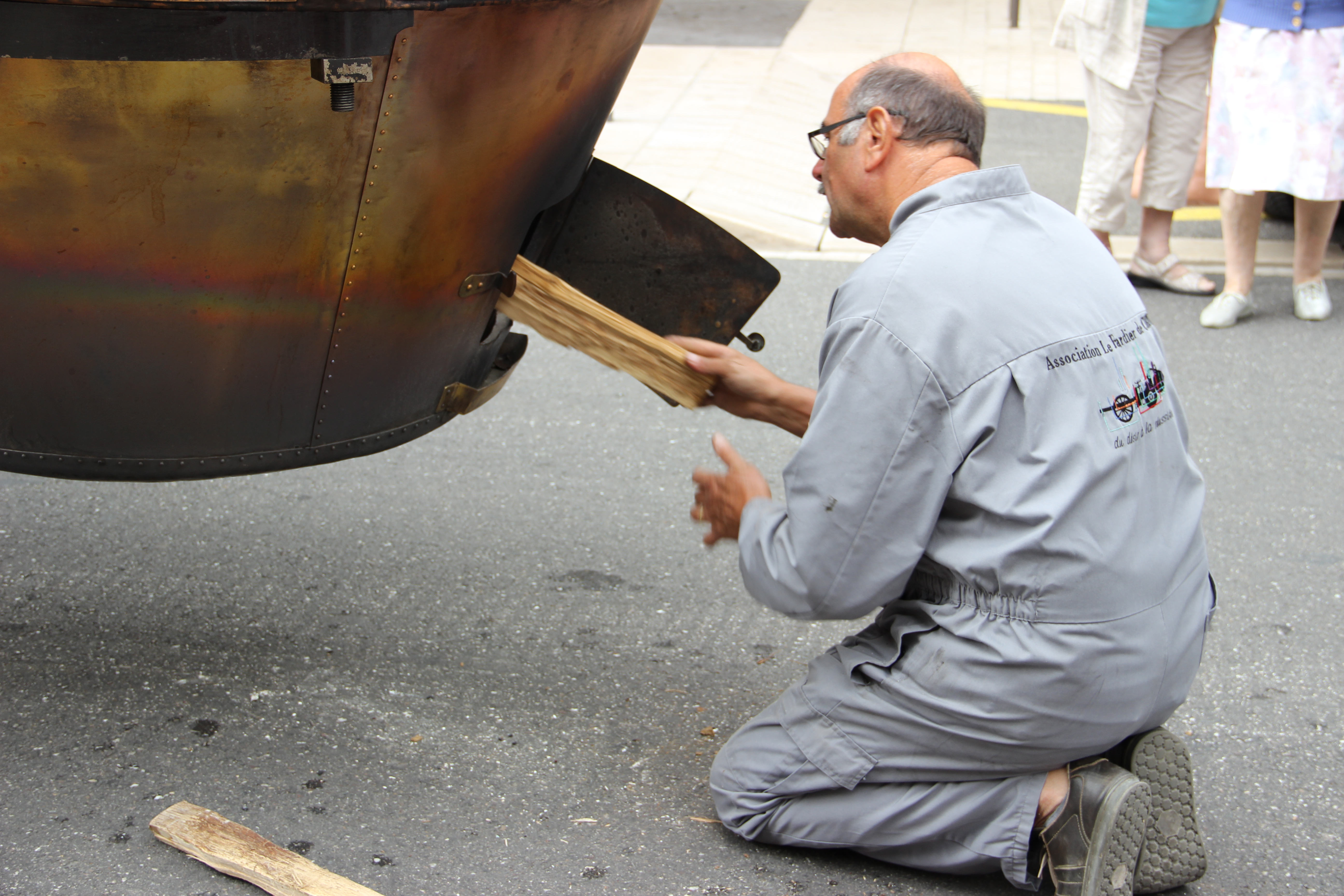 La réplique du fardier à Bar-le-Duc en juillet 2015